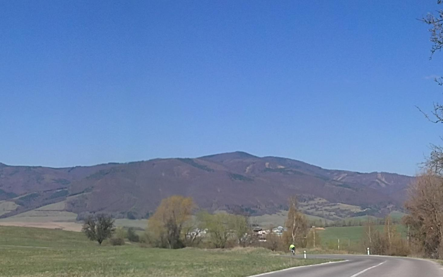 Suchý vrch nad Liešťanmi